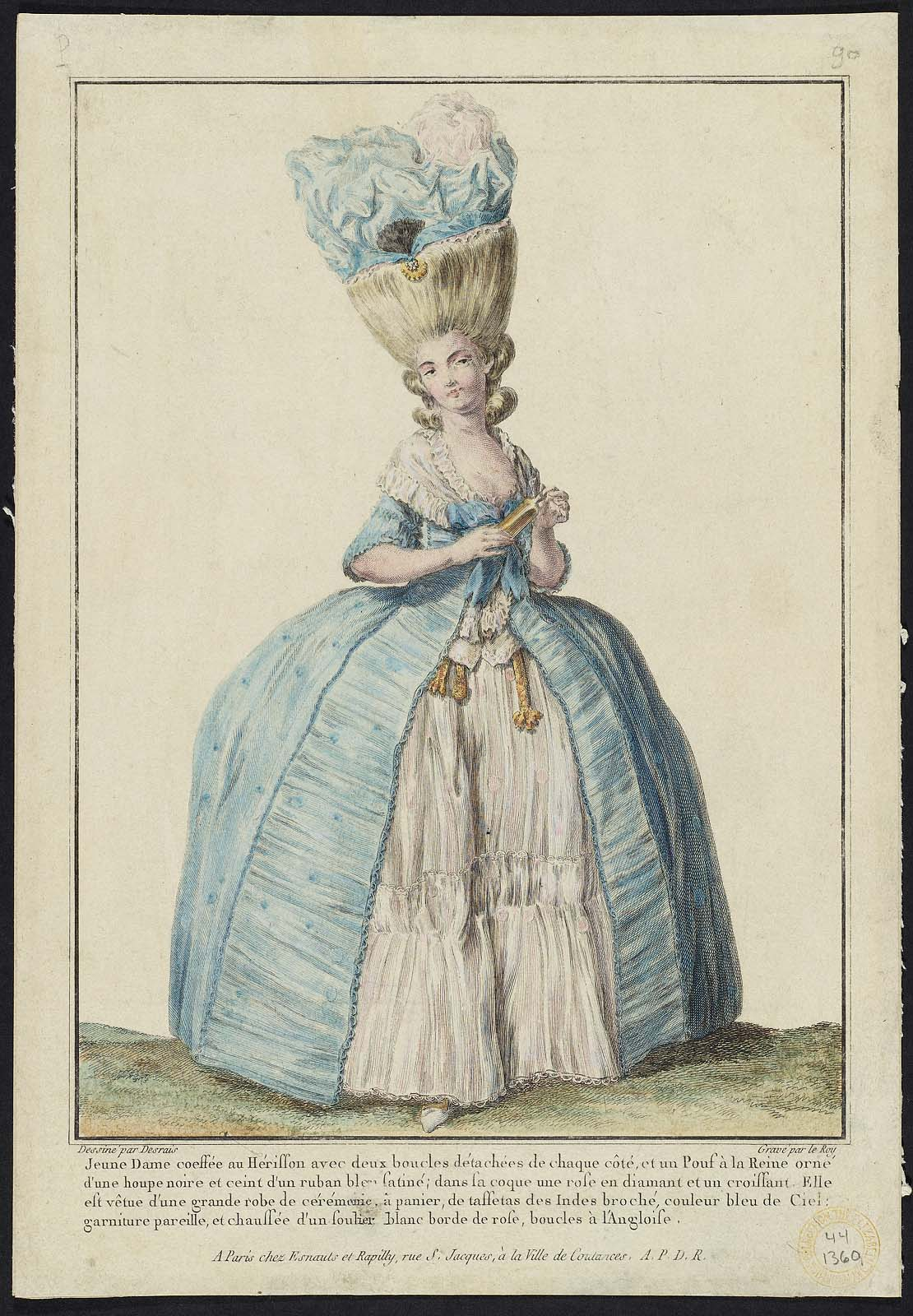 Plate 90 from Gallerie des Modes et Costumes Français. 15e. Cahier des Costumes Français, 9e Suite d'Habillemens à la mode en 1778.